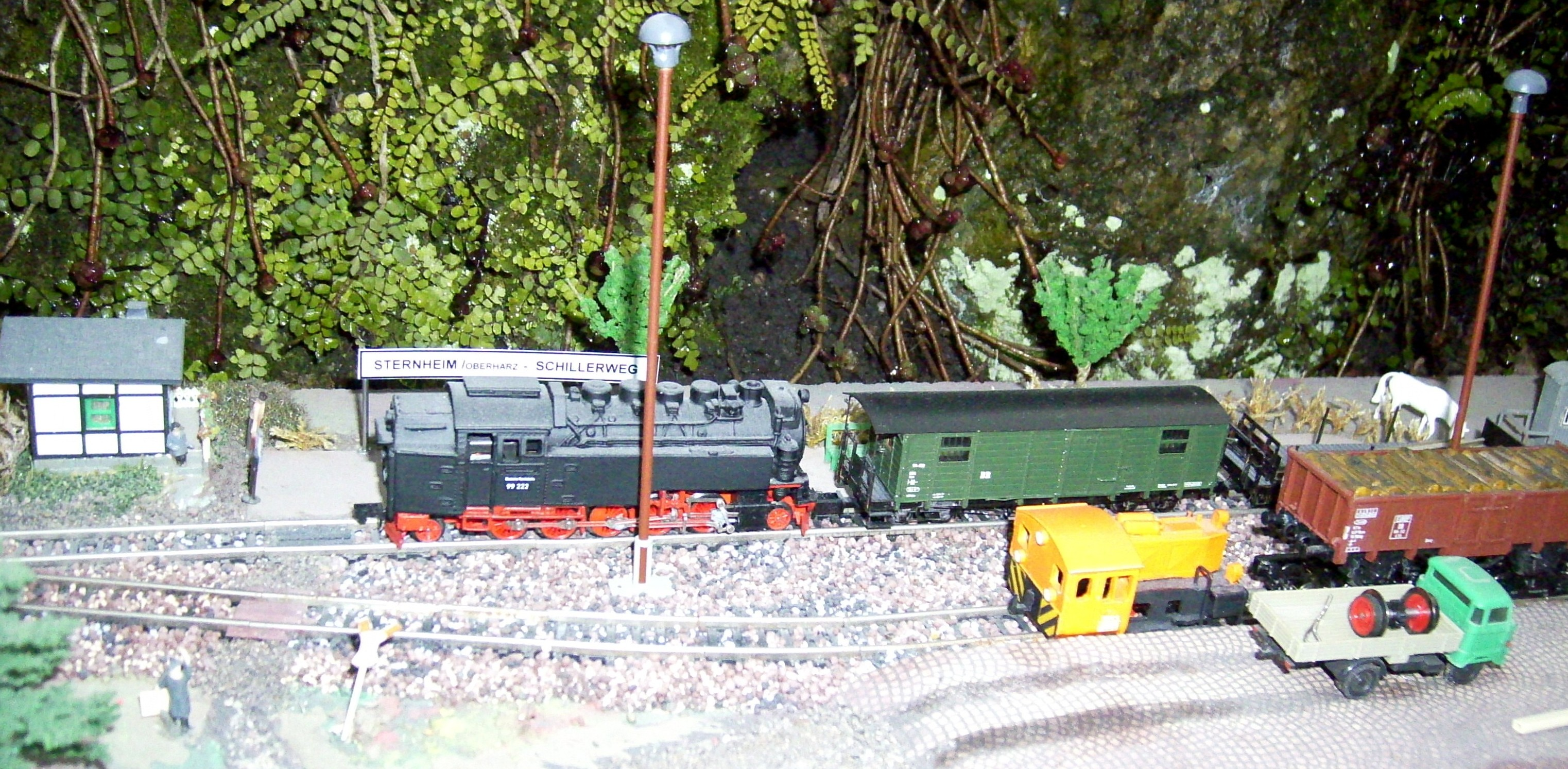 Modelleisenbahn Nenngröße TTm